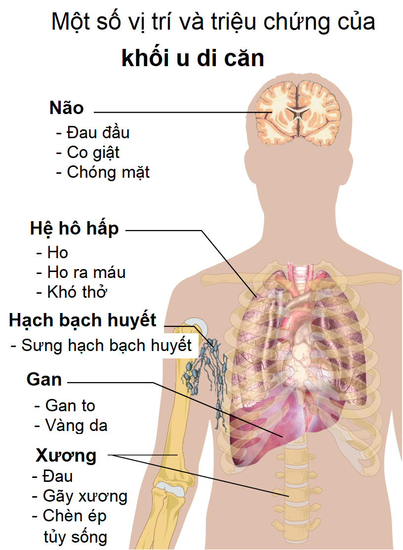 Một số vị trí và triệu chứng thường gặp khi khối u di căn, được dịch từ ảnh tiếng Anh.